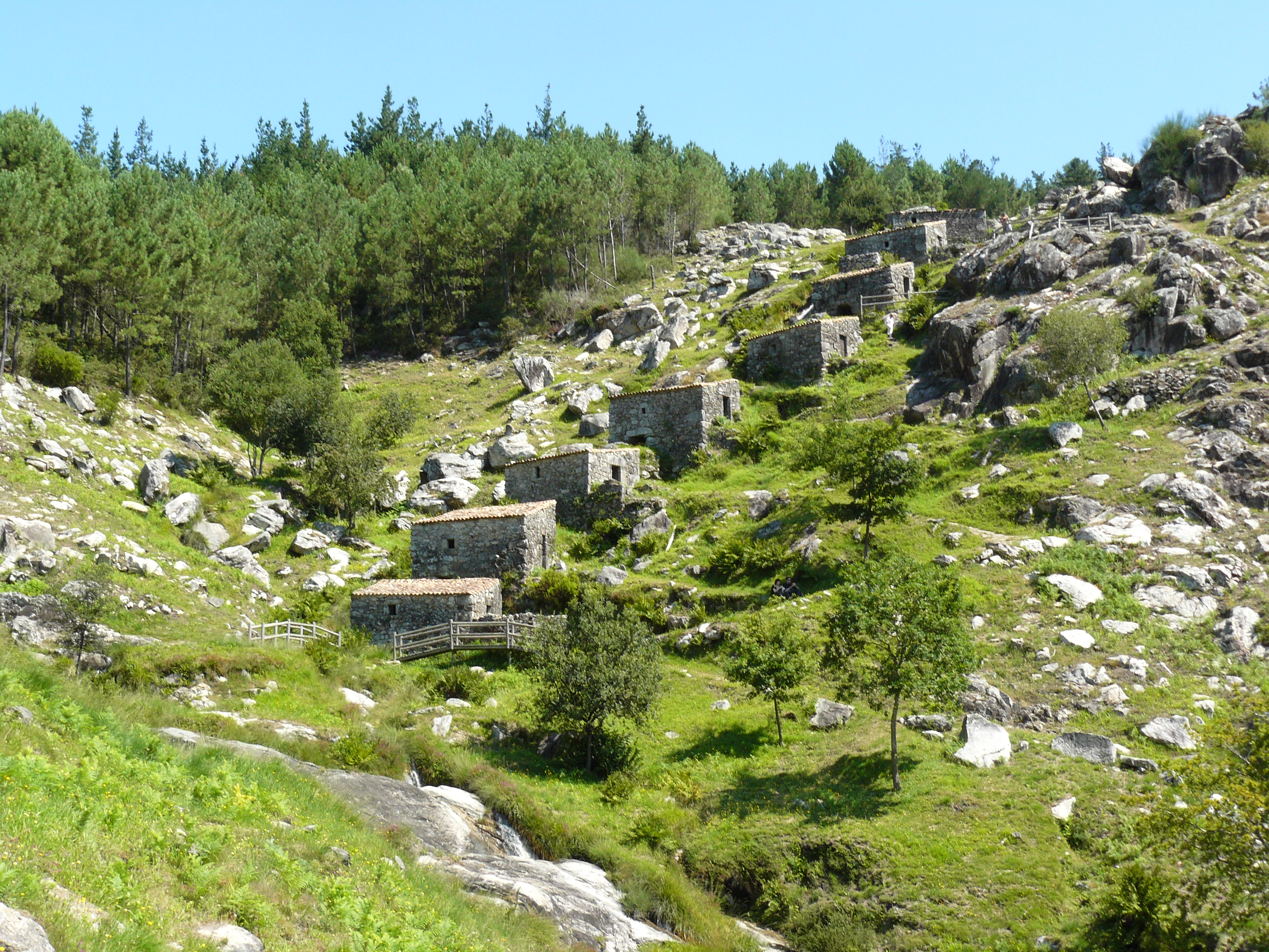 Muiños do Folón e do Picón 1